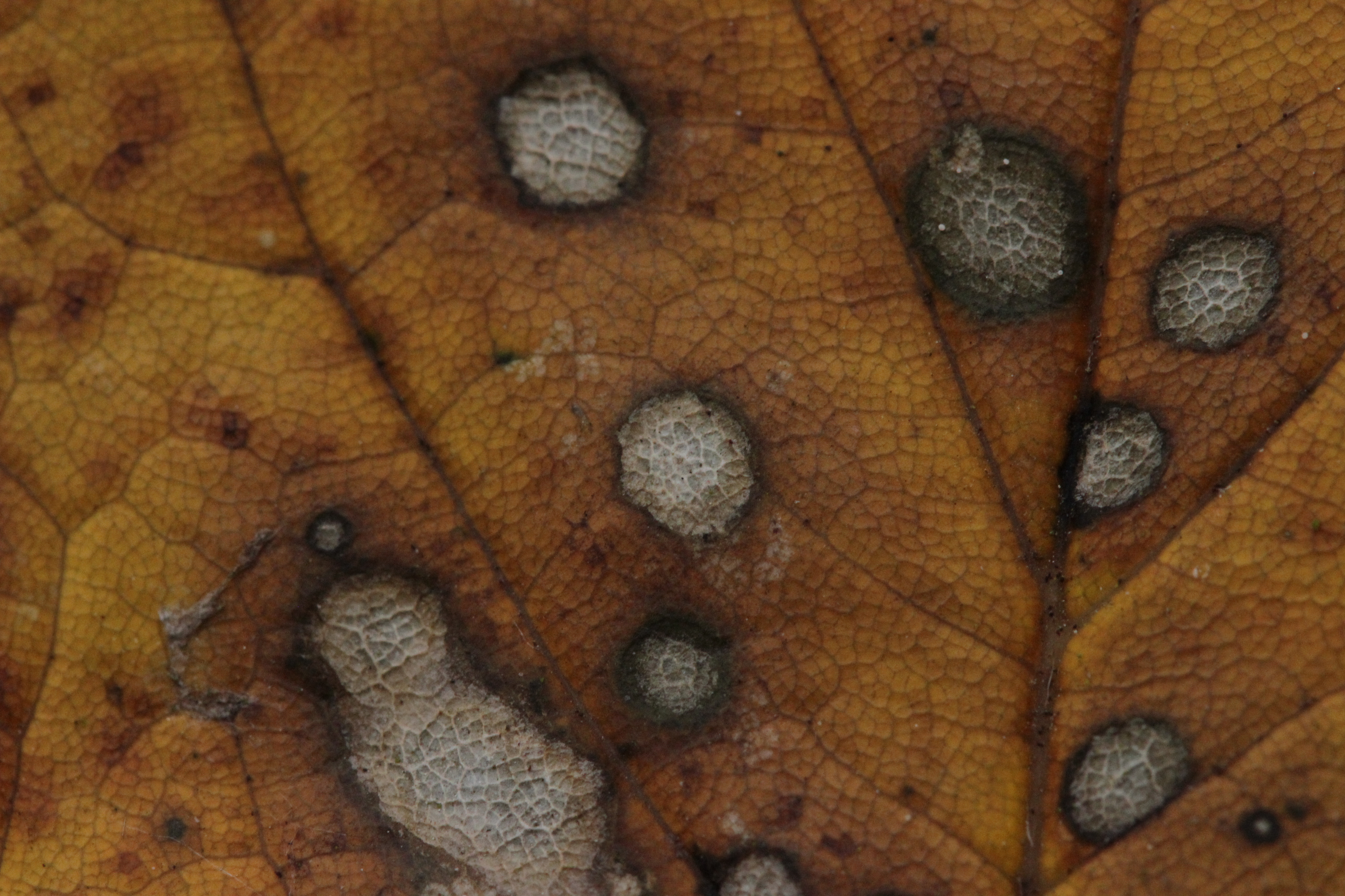 Gray Mold Spot - Cristulariella depraedans